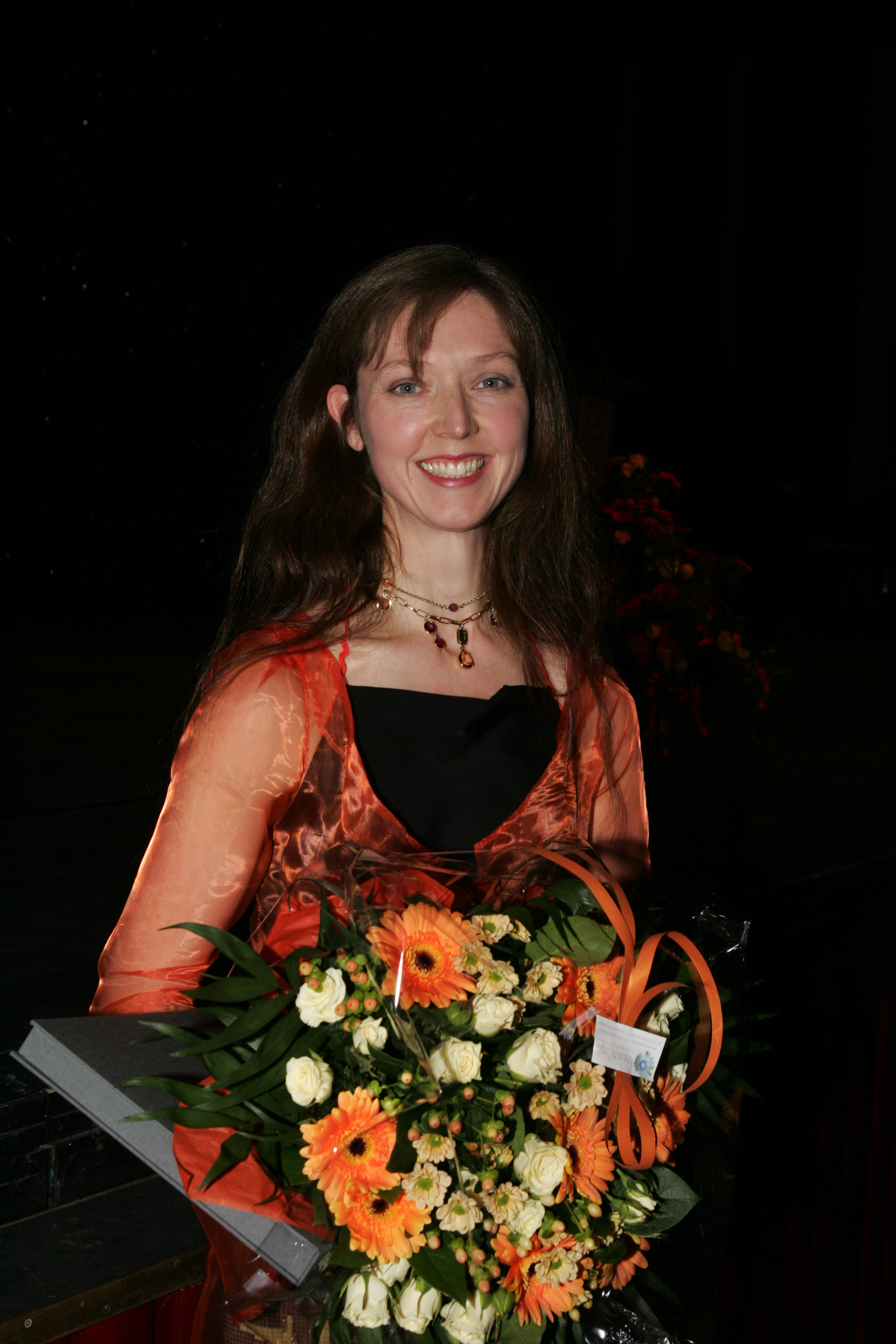 Natasha Barrett, vinnare av Nordiska rådets musikpris 2006.